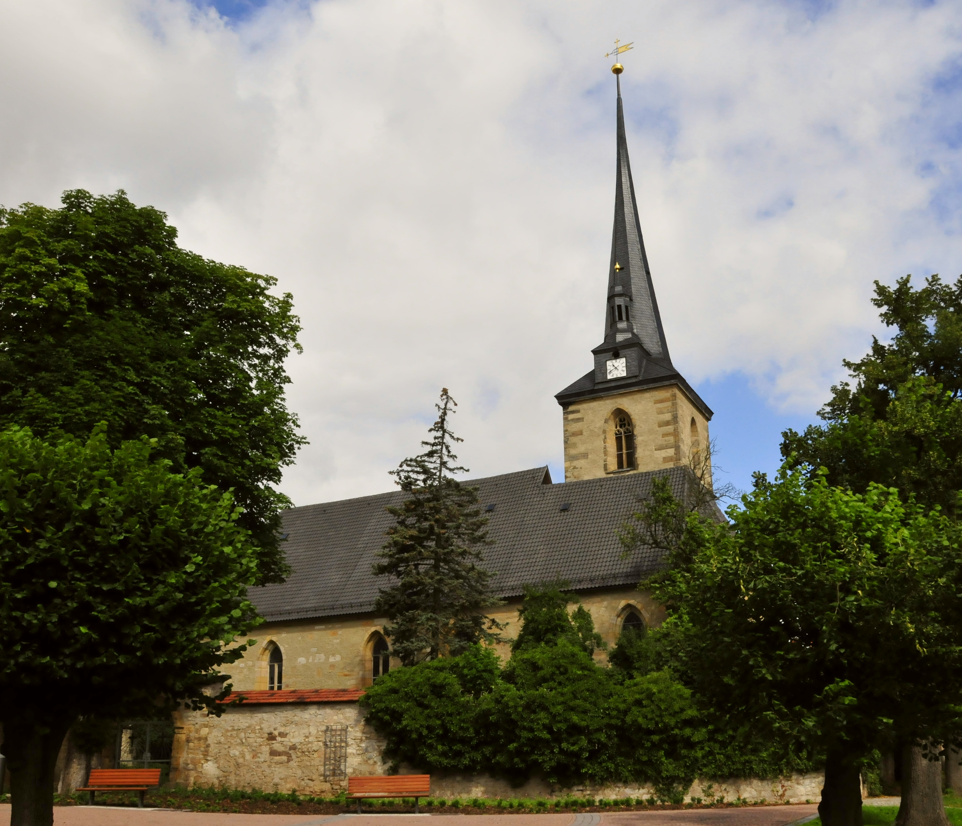 Goldbach, Kirche St. Peter